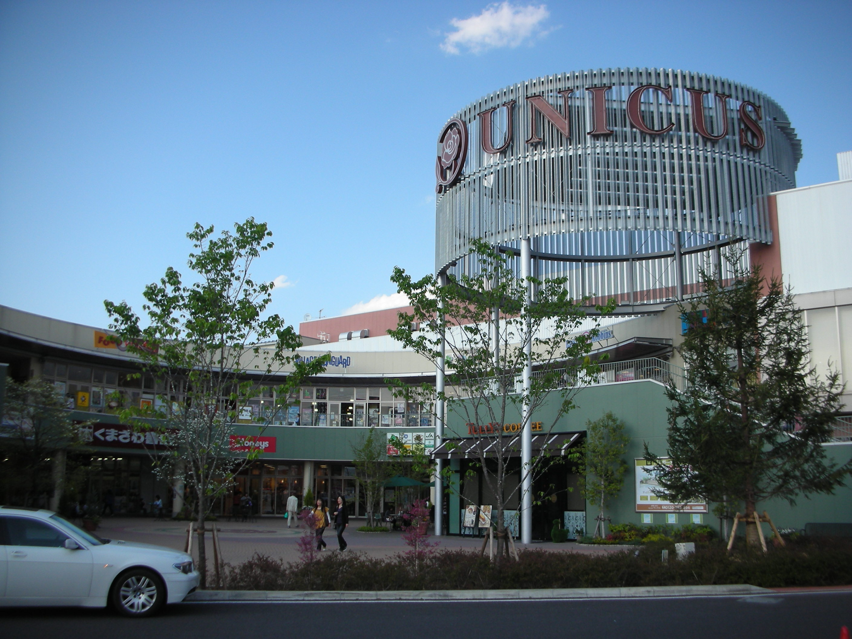 ウニクス上里の外観